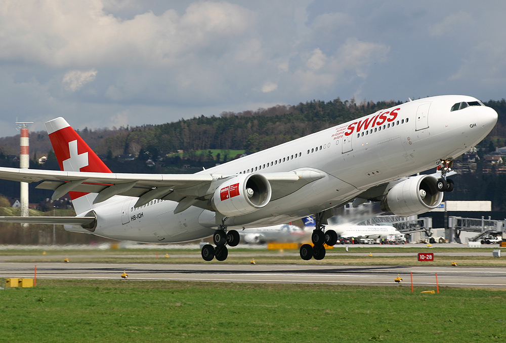 Airbus A330-200 der Swiss am Zürcher Flughafen